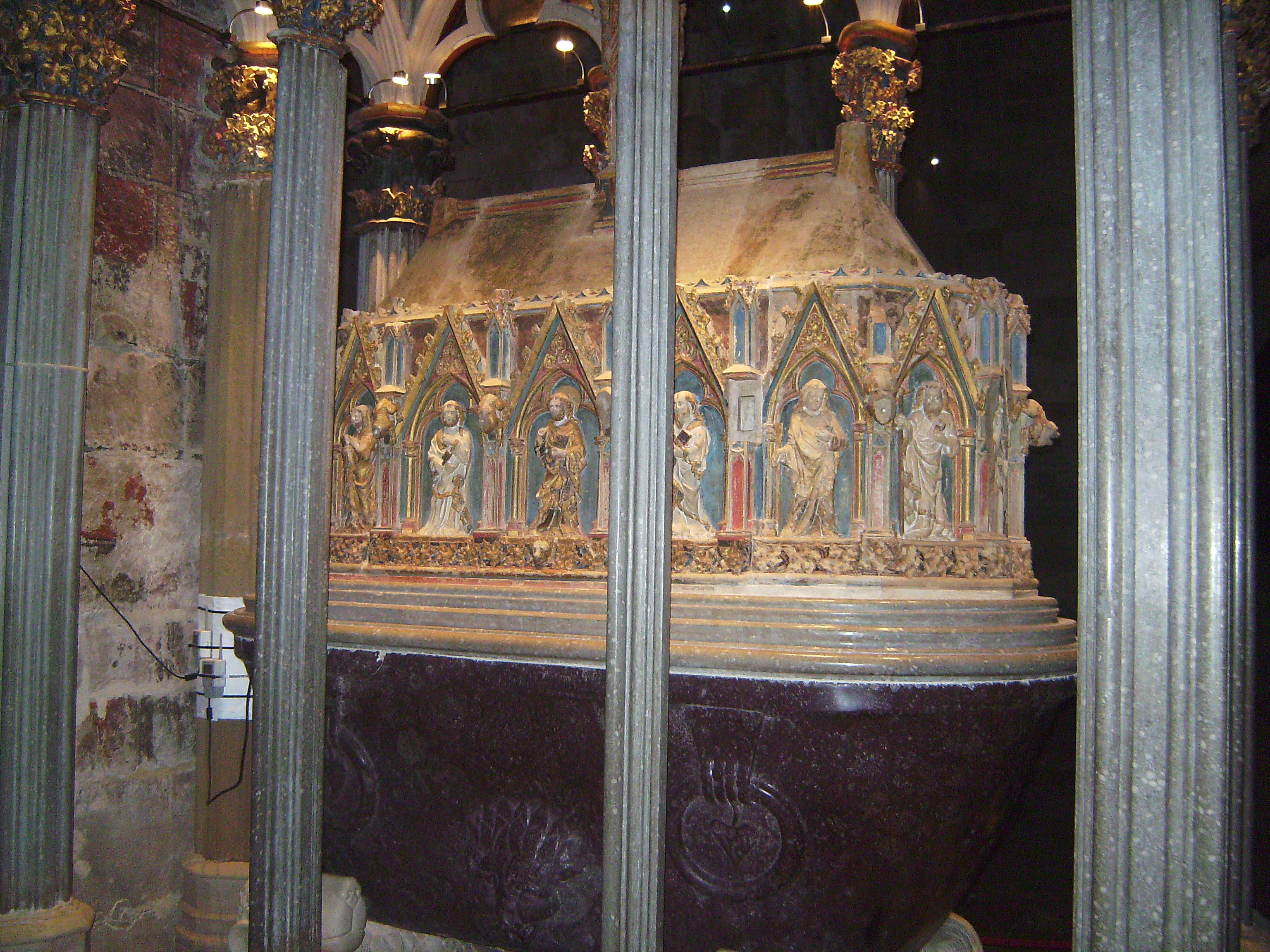 Real Monasterio de Santes Creus - Sepulcro de Pedro III el Grande